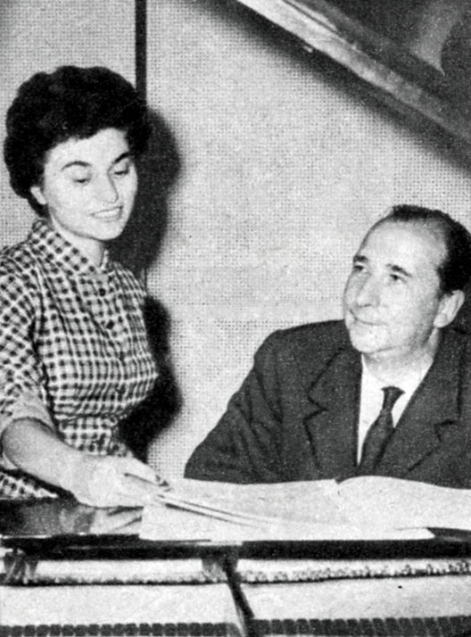 Giorgio Favaretto e Adriana Martino